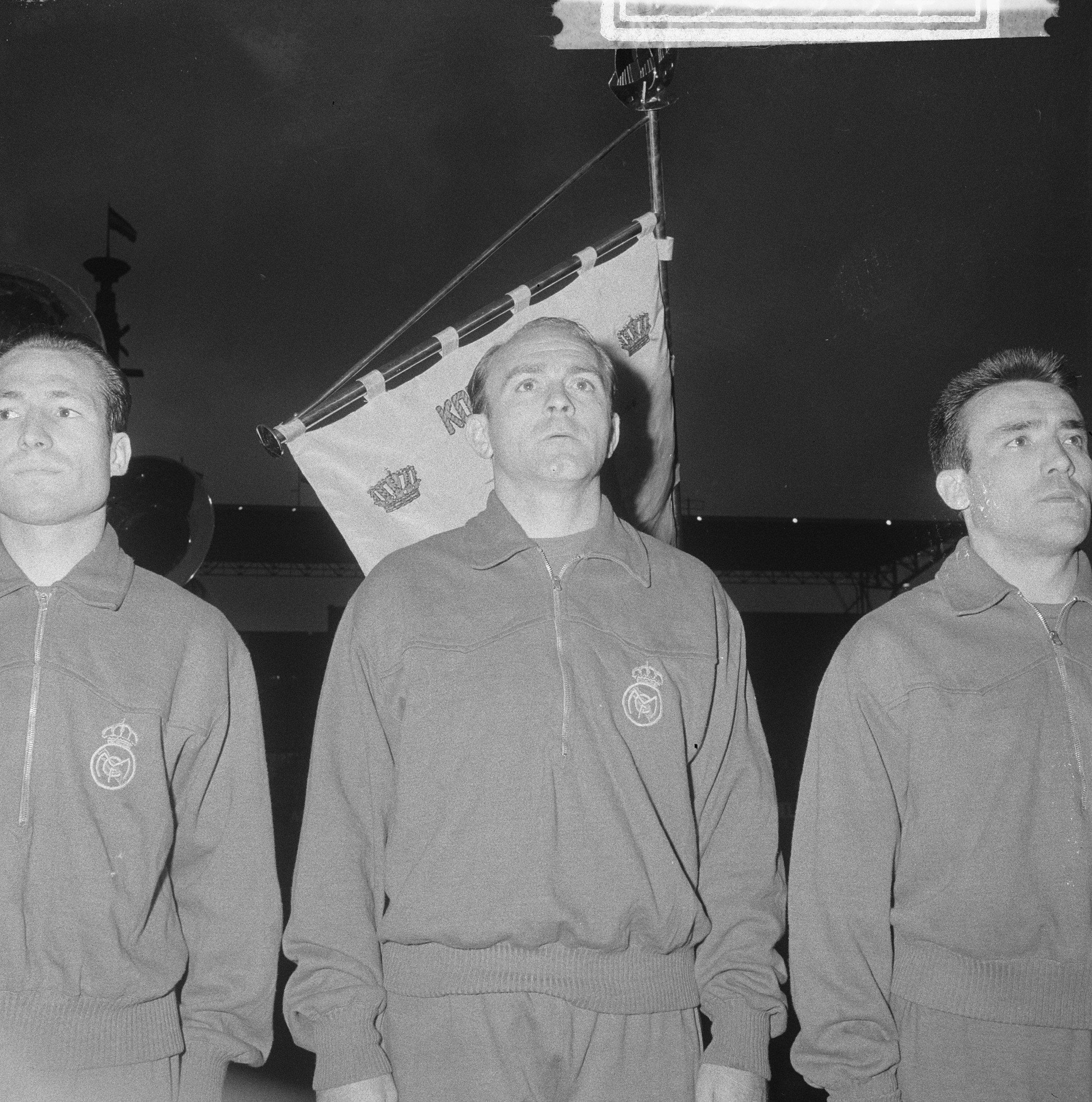 Collectie / Archief : Fotocollectie Anefo Reportage / Serie : [ onbekend ] Beschrijving : Beufica tegen Real Madrid 5-3 spelers Datum : 2 mei 1962 Trefwoorden : SPELERS, sport, voetbal Instellingsnaam : Real Madrid Fotograaf : Nijs, Jac. de / Anefo Auteursrechthebbende : Nationaal Archief Materiaalsoort : Negatief (zwart/wit) Nummer archiefinventaris : bekijk toegang 2.24.01.03 Bestanddeelnummer : 913-8534